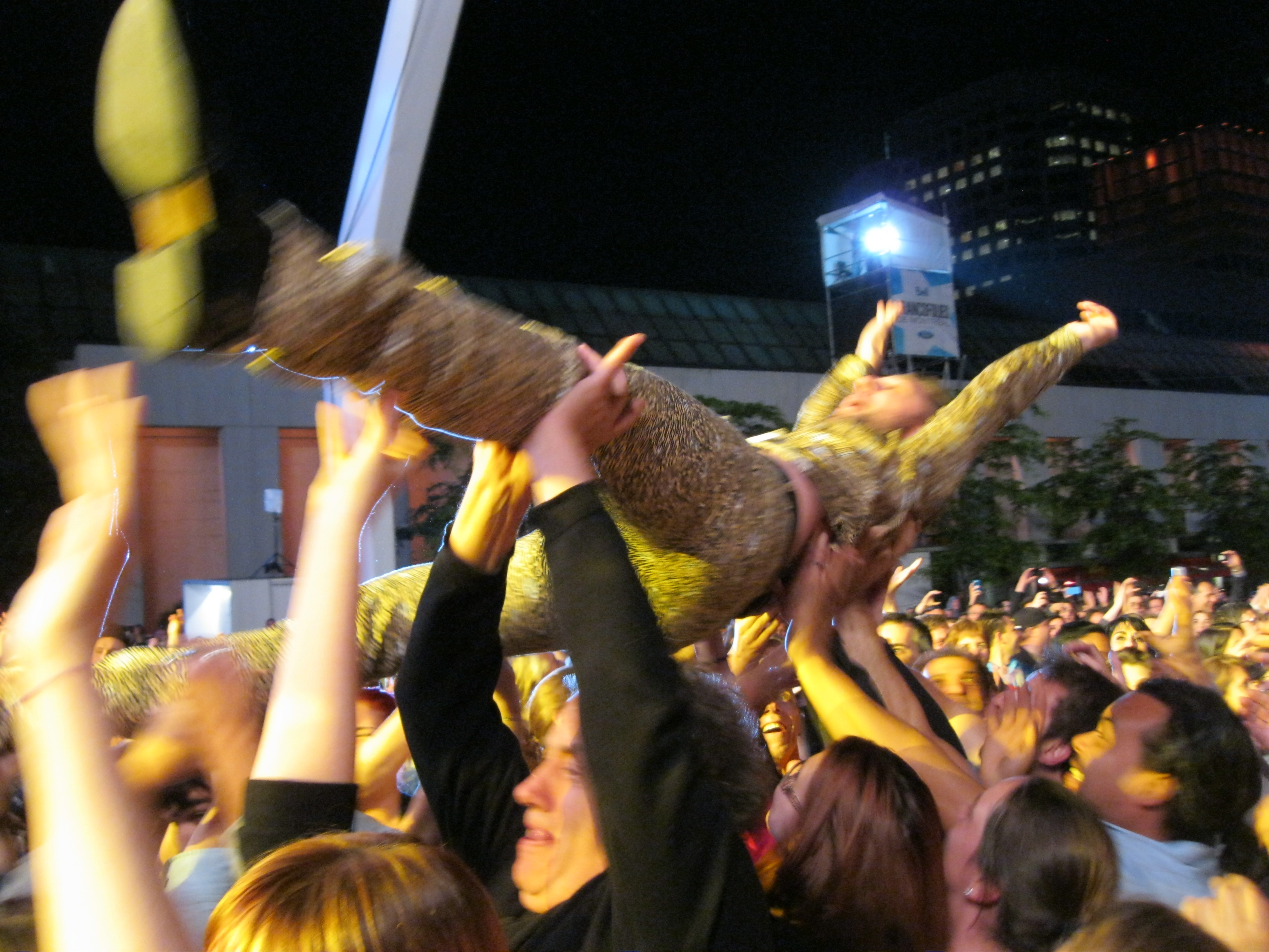 Pour célébrer les 25 ans des FrancoFolies de Montréal, le président, Alain Simard, a eu l'idée de réunir 25 artistes (ou groupes) qui chanteraient chacun LA chanson de leur répertoire la plus connue du public. Le spectacle a eu lieu lundi le 17 juin 2013 à partir de 21:00 à la place des Festivals. Dans l'ordre, sont apparus : Karim Ouellet, Ariane Moffatt, Richard Séguin, Corneille, Lisa LeBlanc, Daniel Lavoie, Mara Tremblay, Mes Aïeux, Luc De Larochelière, Dumas, Isabelle Boulay, Yann Perreau, Laurence Jalbert, Stefie Shock, Michel Rivard, Pierre Lapointe, Dan Bigras, Paul Piché, Vincent Vallières, Les Respectables, Damien Robitaille, Loco Locass, Daniel Boucher, Marjo et Éric Lapointe.